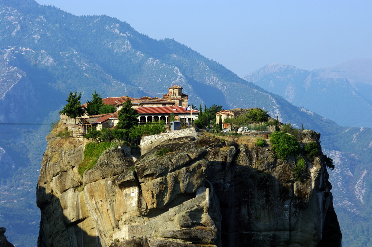 Agia Triada, Meteora